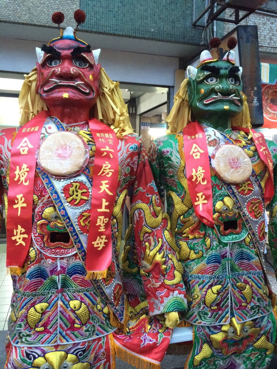 中文（台灣）: 斗南順安宮，伴隨媽祖出巡的千里眼與順風耳。